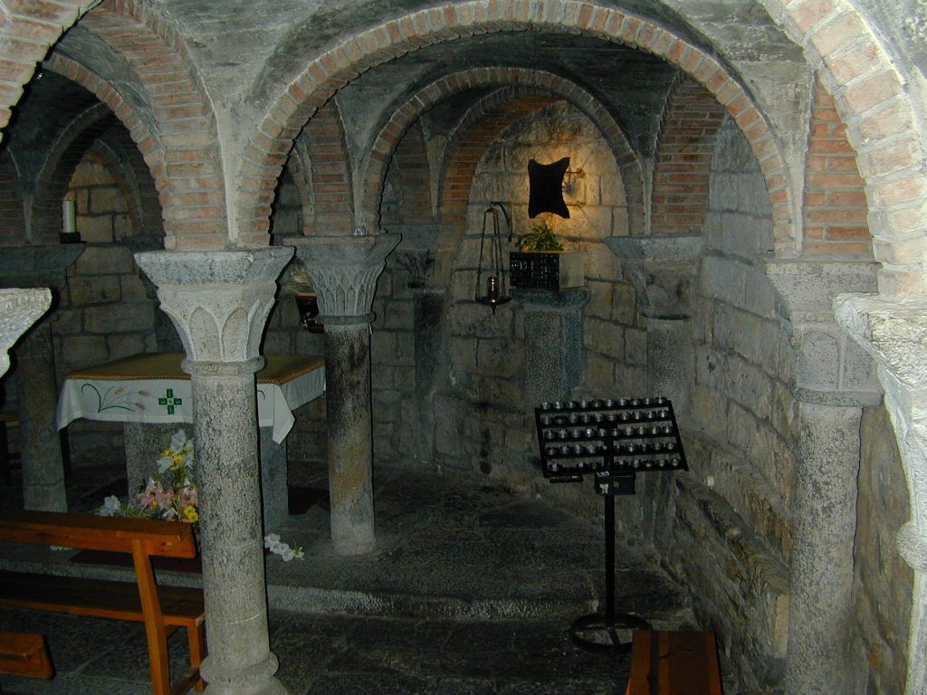 Vista de la cripta de la Iglesia de Santa María de Aínsa